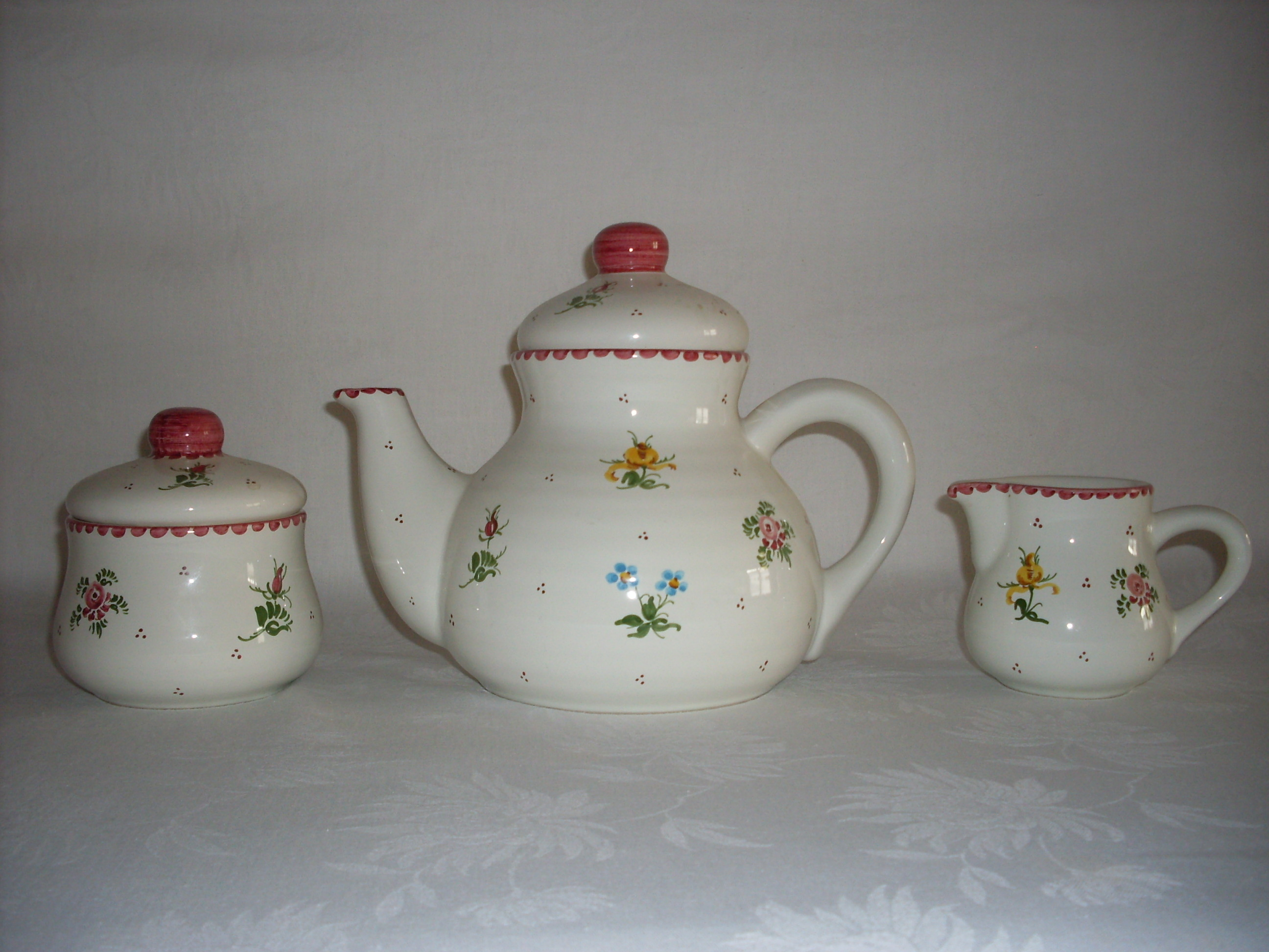 Teeservice - Teile, Dekor "Streublümchen", handbemalt, 4.MZ mit Zuckerdose Art.Nr. 7834; Teekanne Art.Nr. 7829; Sahnegießer Art.Nr. 7835 von Ulmer Keramik